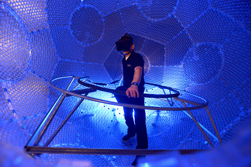 Laboratorium Zanurzonej Wizualizacji Przestrzennej Politechniki Gdańskiej.